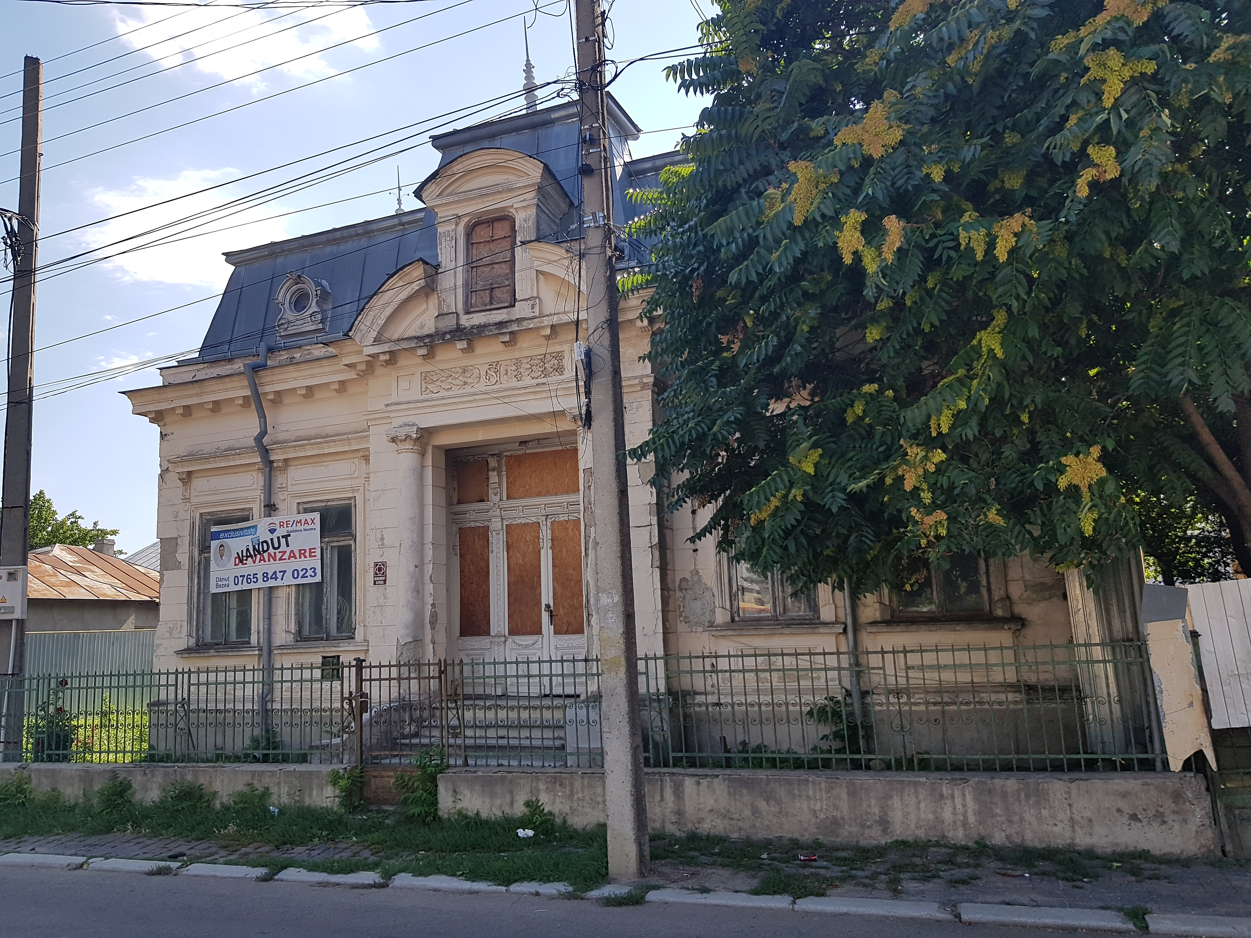 Monument istoric